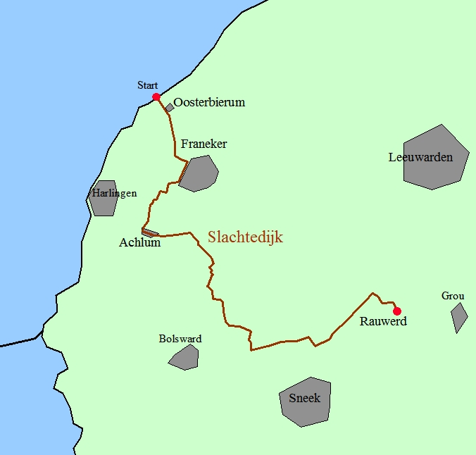 Slachtedijk, Slachtedyk, De Slachte. Een dijk in Friesland. De Slachtemarathon.